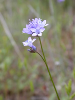 Gilia achilleifolia